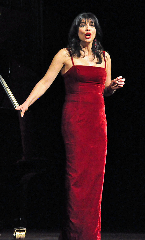 Noeami Nadelmann, 2009